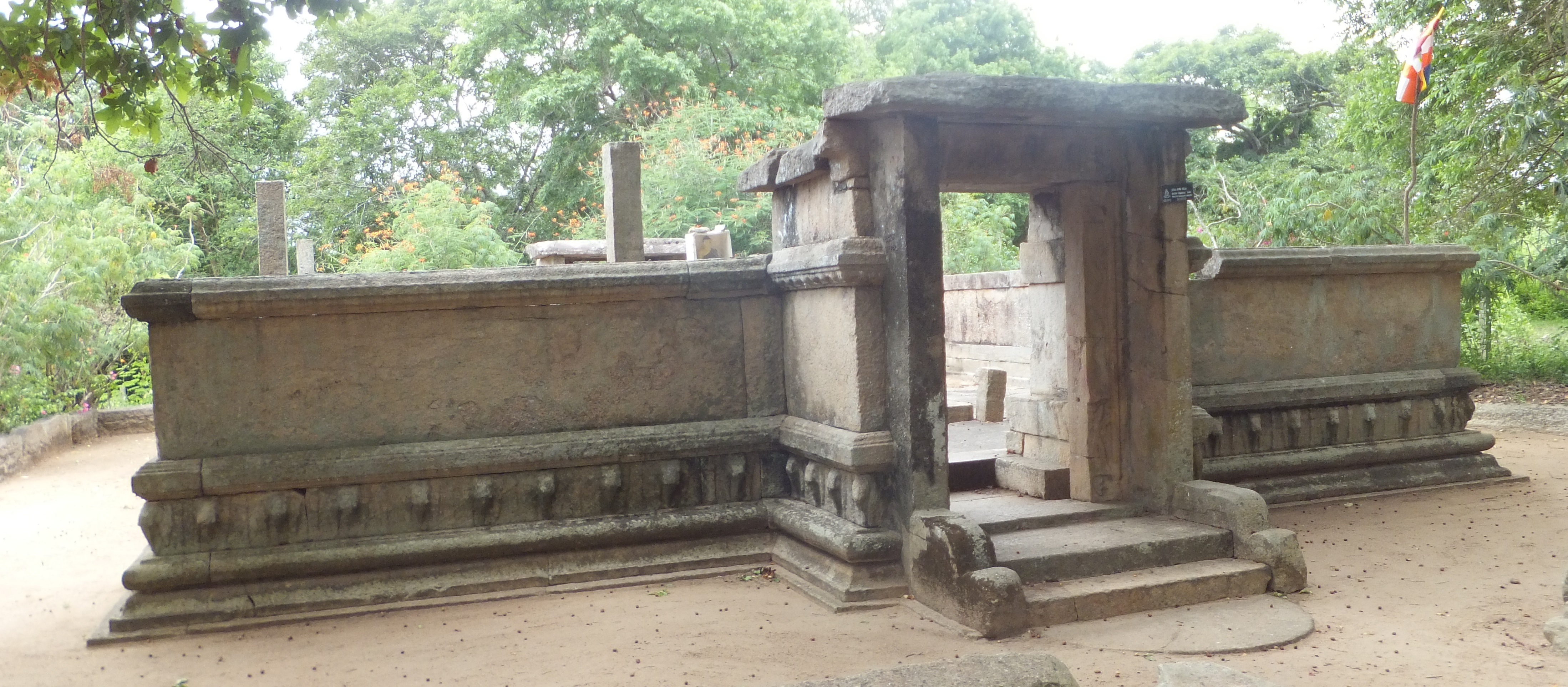 සිංහල: නිල්ලග්ගම බෝධි ඝරය